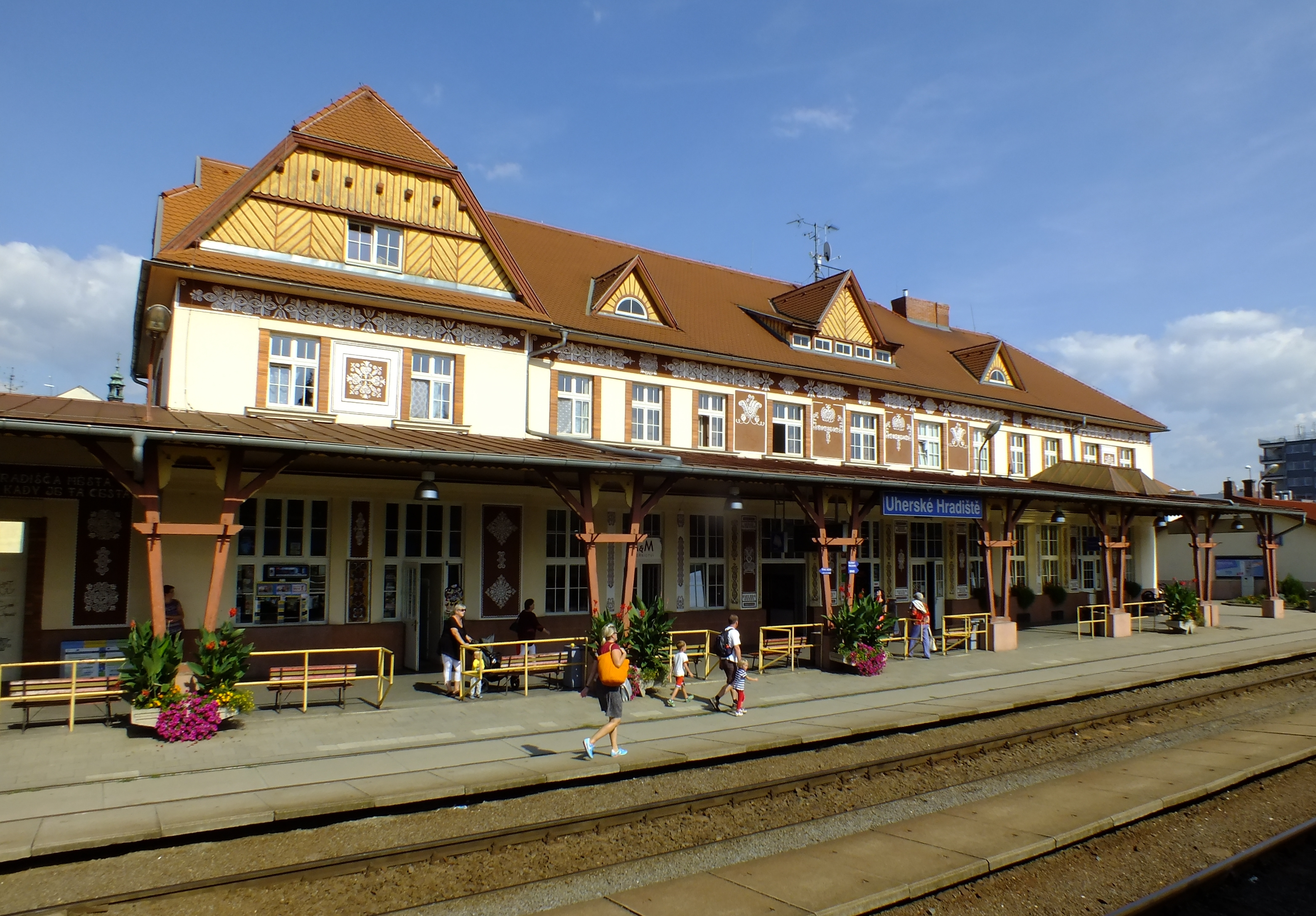 Výpravní budova